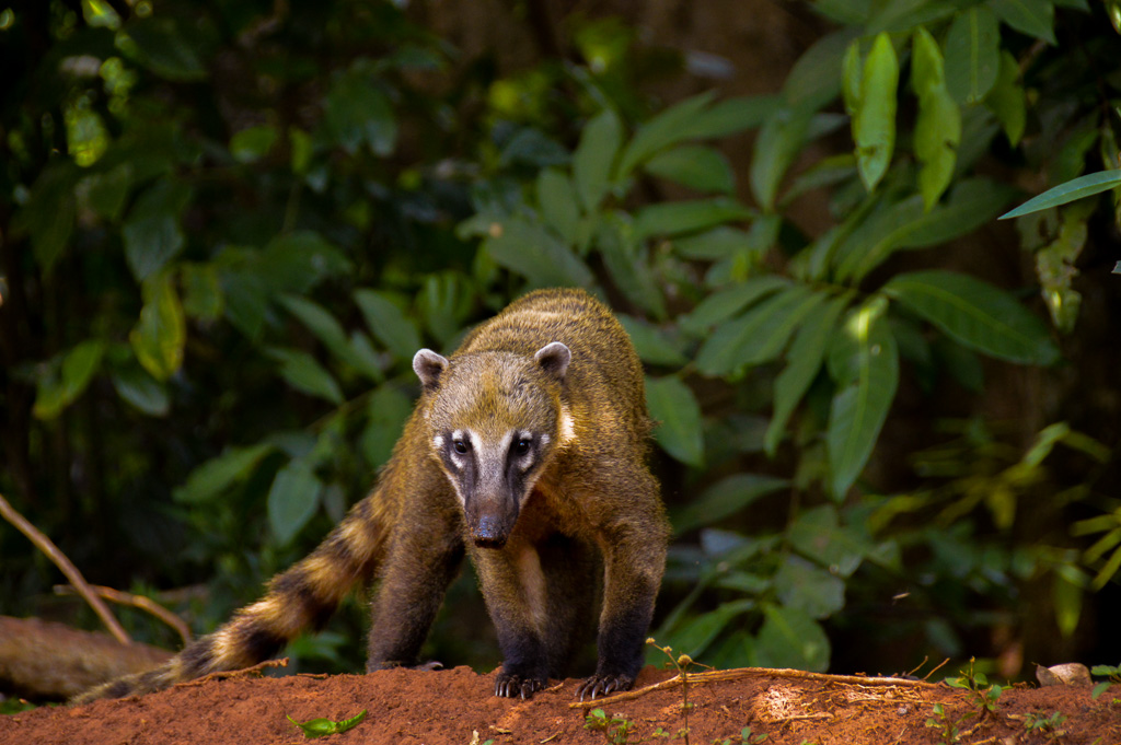 A foto do quati foi tirada num patrimônio histórico e turístico, a Fazenda Santa Maria do Monjolinho, localizada no município de São Carlos no estado de São Paulo.